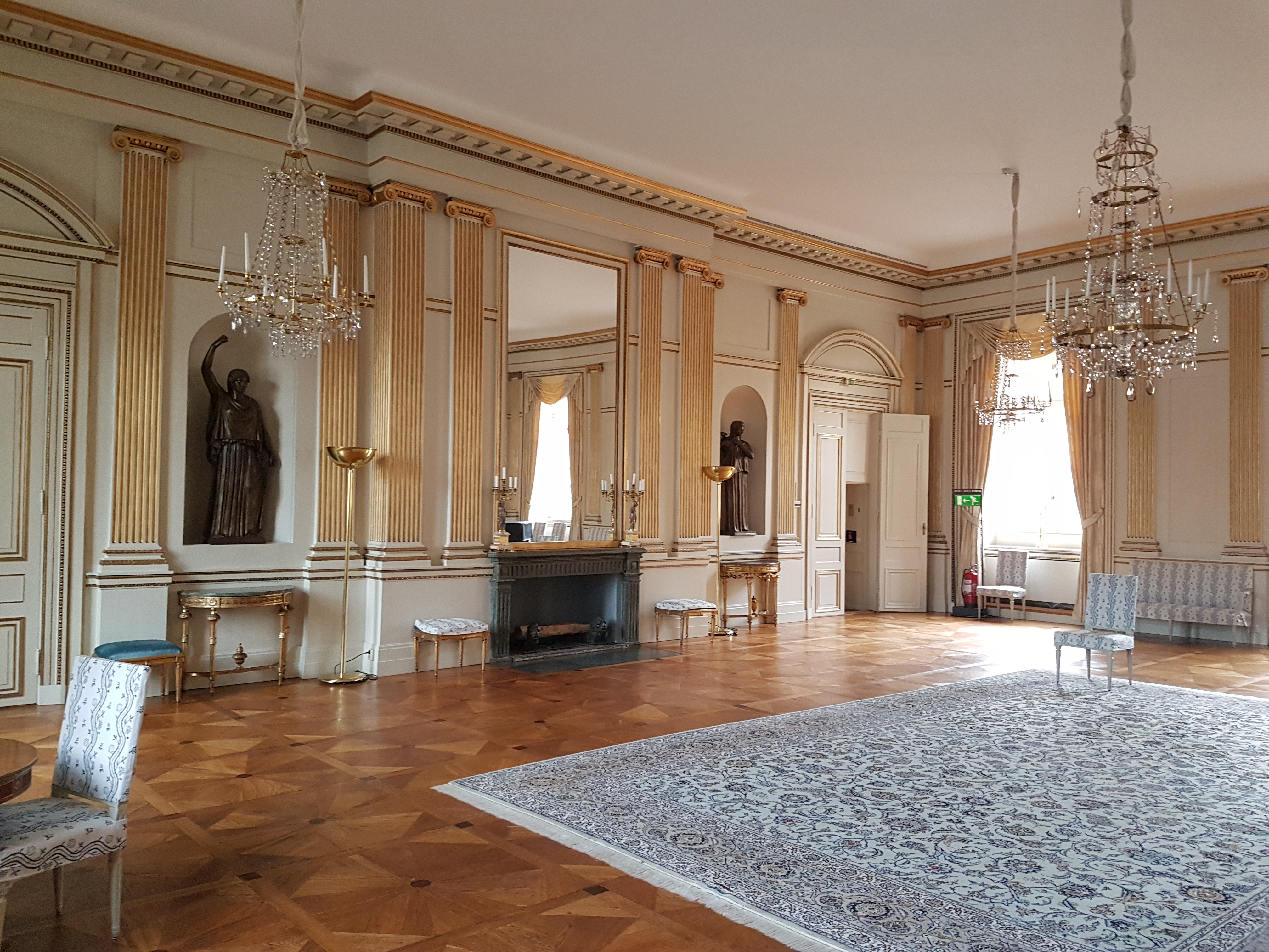 I Arvfurstens palats 2018